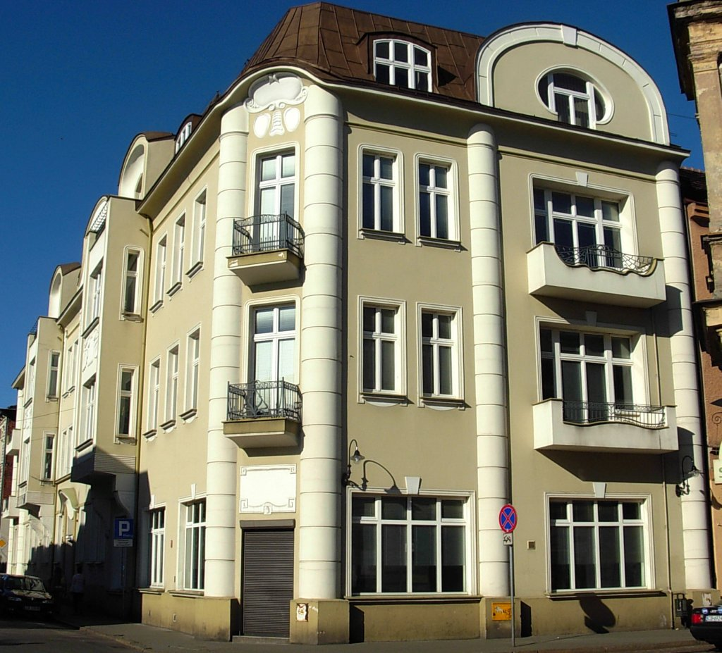 Kamienica ul. Warmińskiego 18, róg Dworcowej w Bydgoszczy